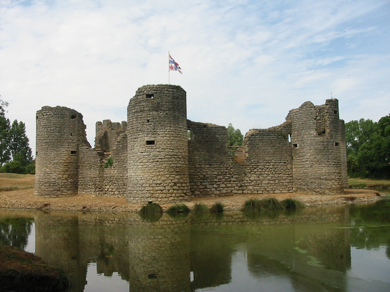 Vue générale du château de Commequiers